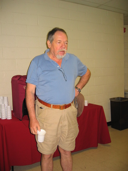 Foto di Peter Freyd